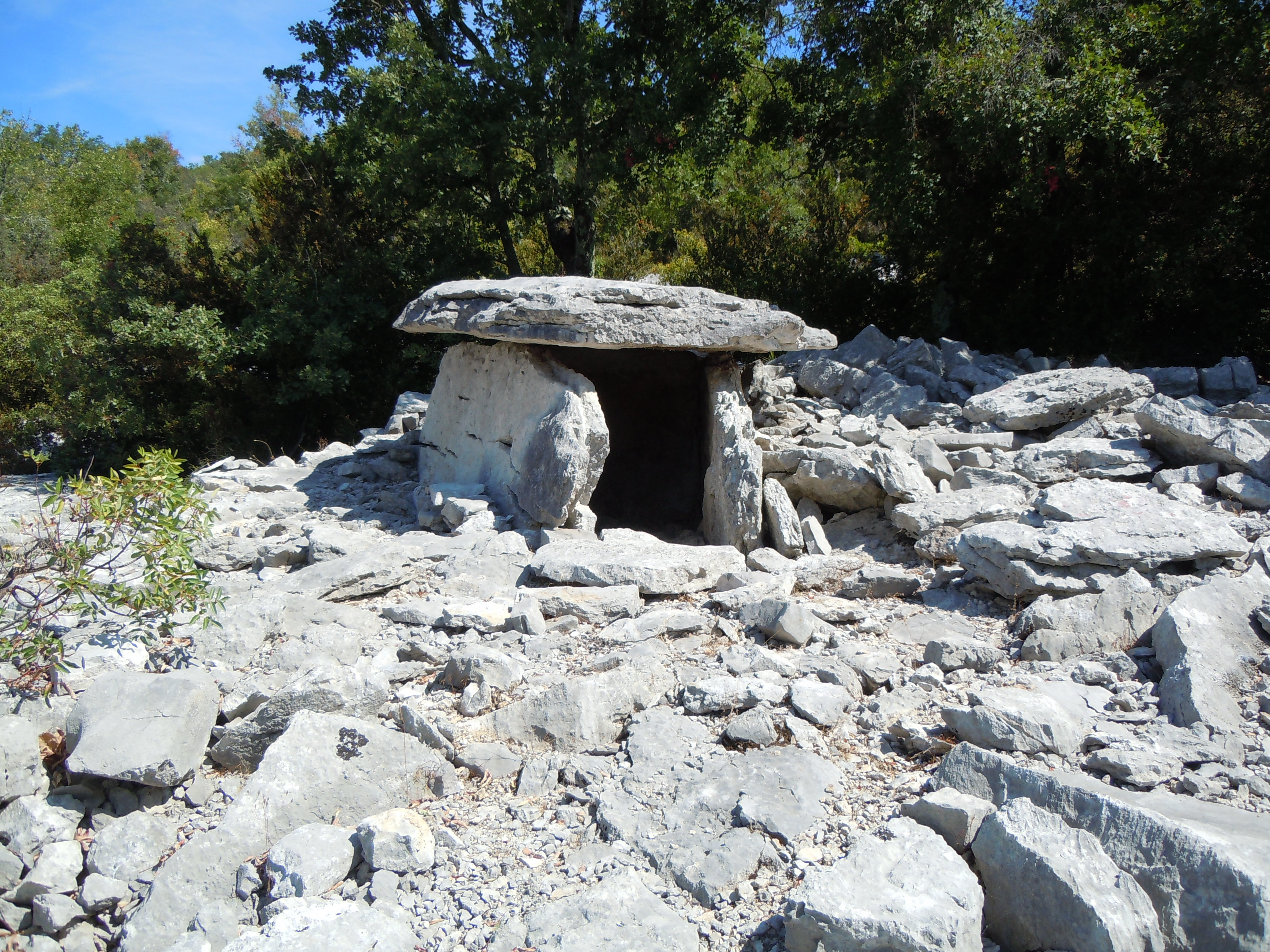 Dolmen de Font Méjanne - Dolmen n° 14 - Saint-Alban-Auriolles- Ardèche - France